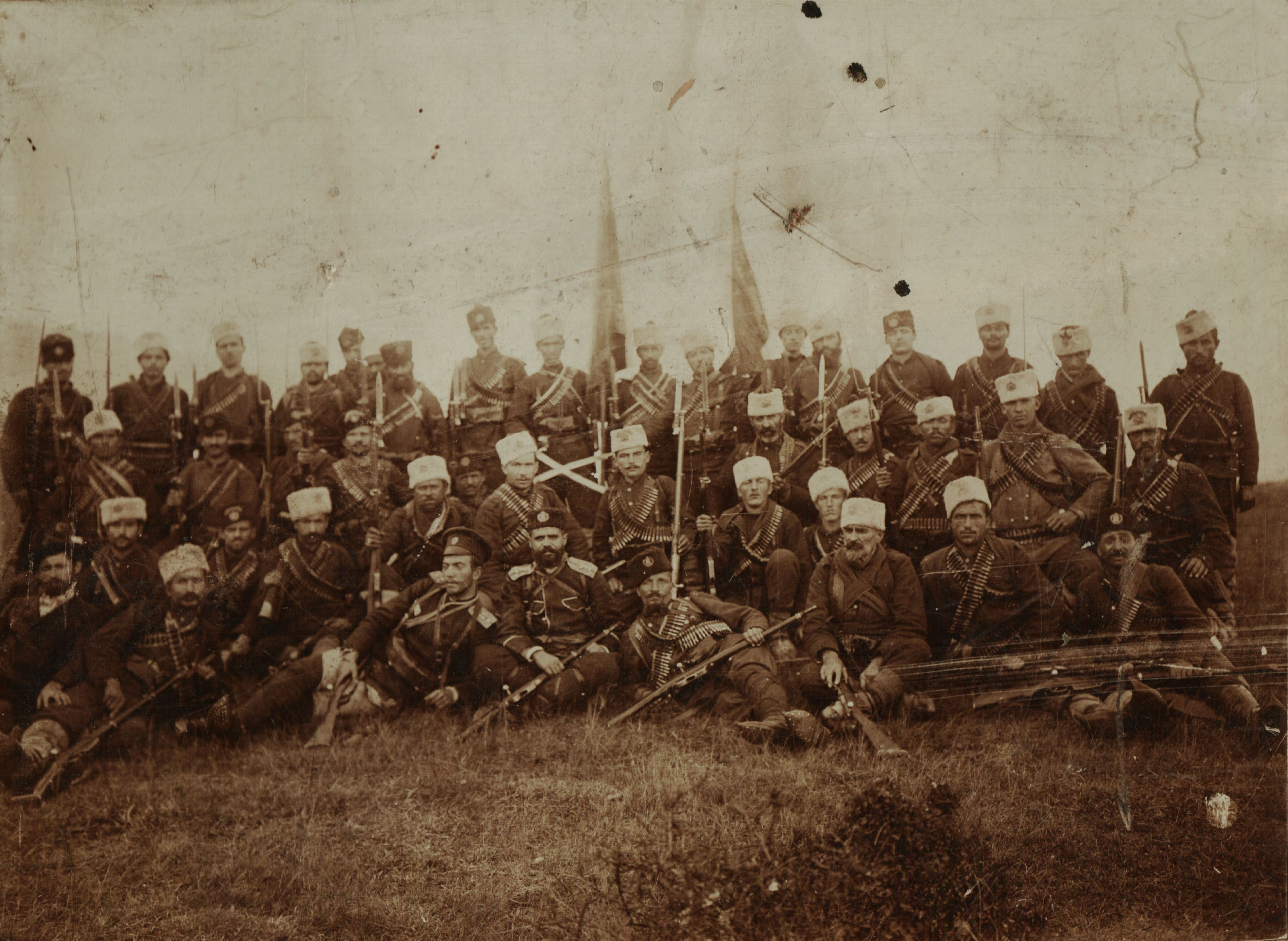 Обединената чета на Тодор Саев и Никола Лефтеров, 1903 г.